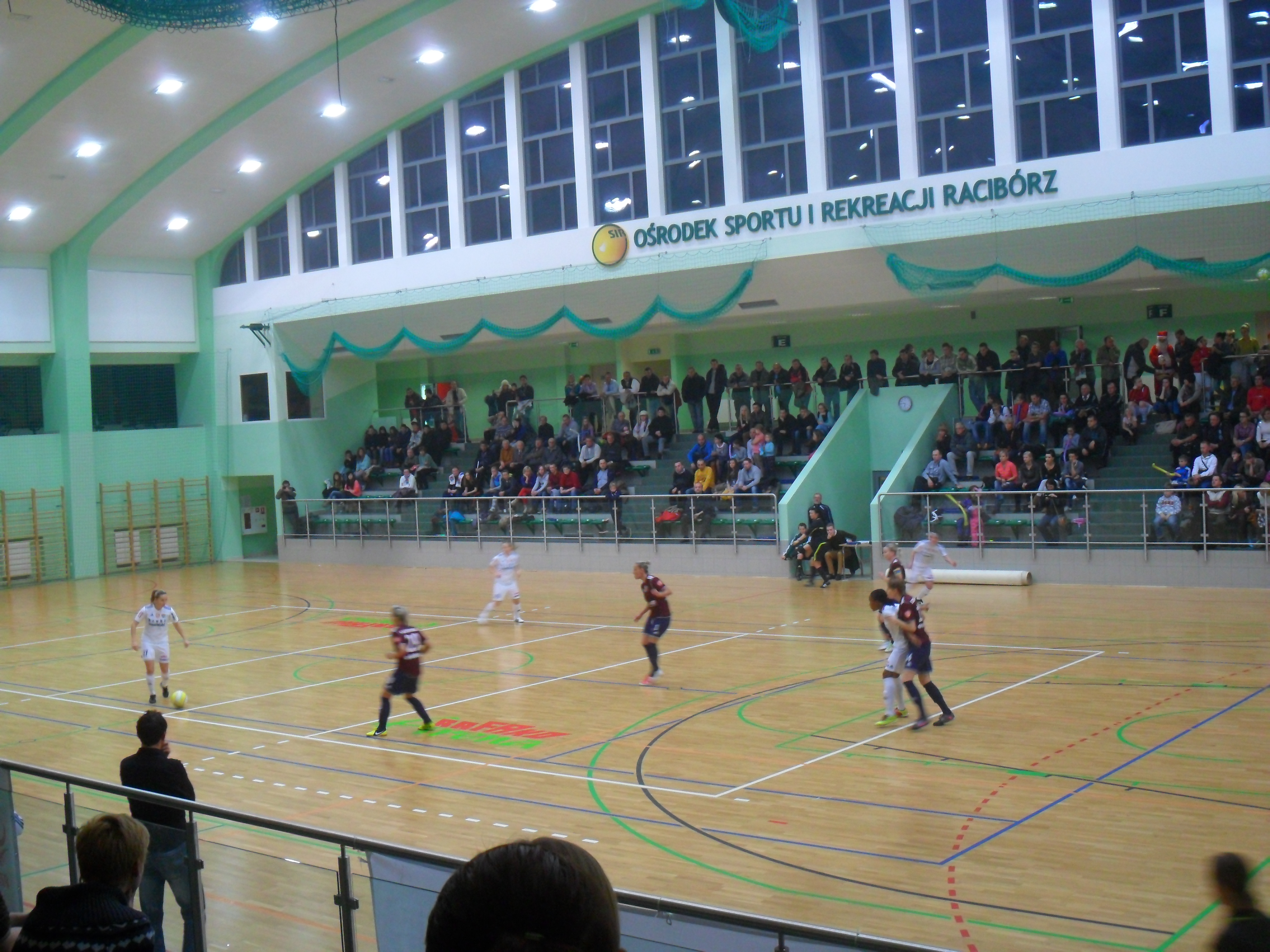 XXXIII Halowe Mistrzostwa Polski kobiet w piłce nożnej - 9 grudnia 2012, Arena Rafako w Raciborzu. Na zdjęciu mecz RTP Unii Racibórz z Pogonią Women Szczecin (6:0).